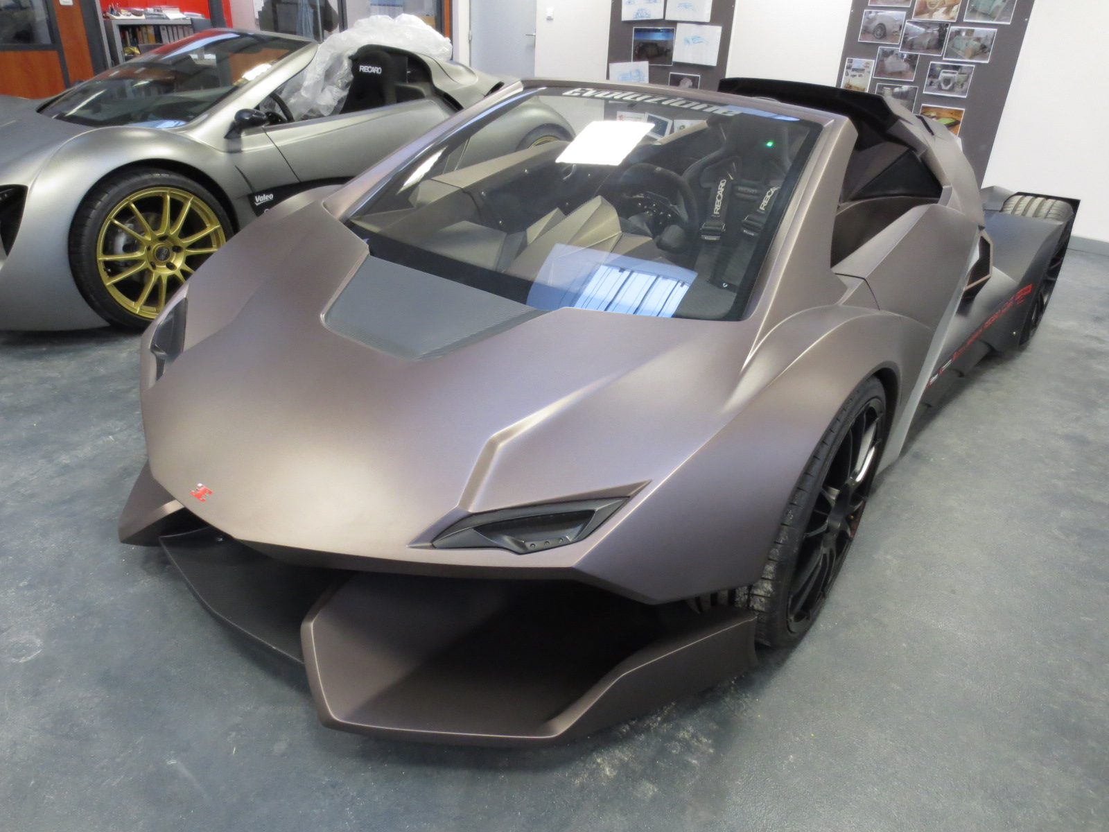 Sbarro Evoluzione - Show room de l'école Espera Sbarro de Montbéliard